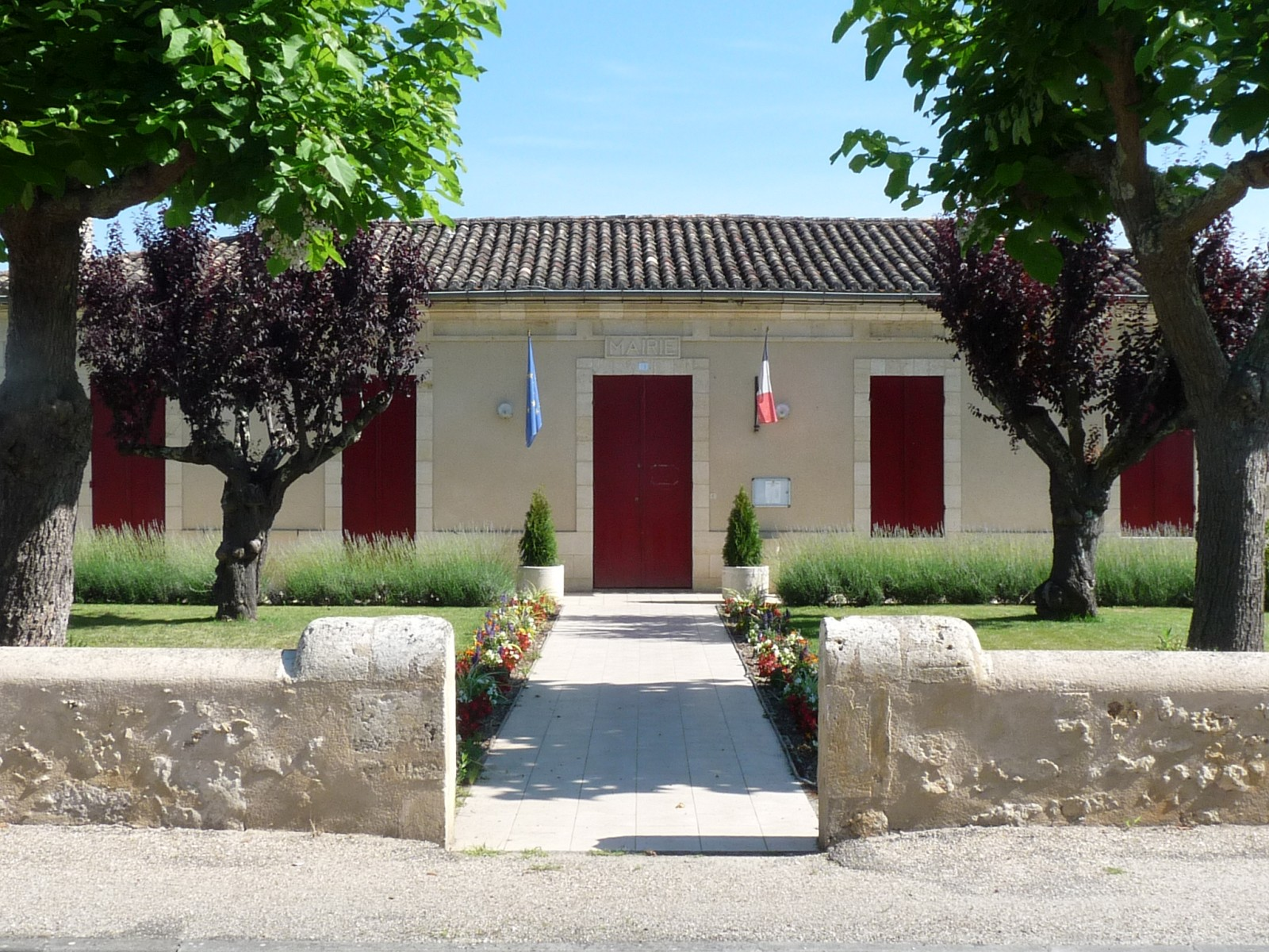 Mairie de Mouliets-et-Villemartin, Gironde, France